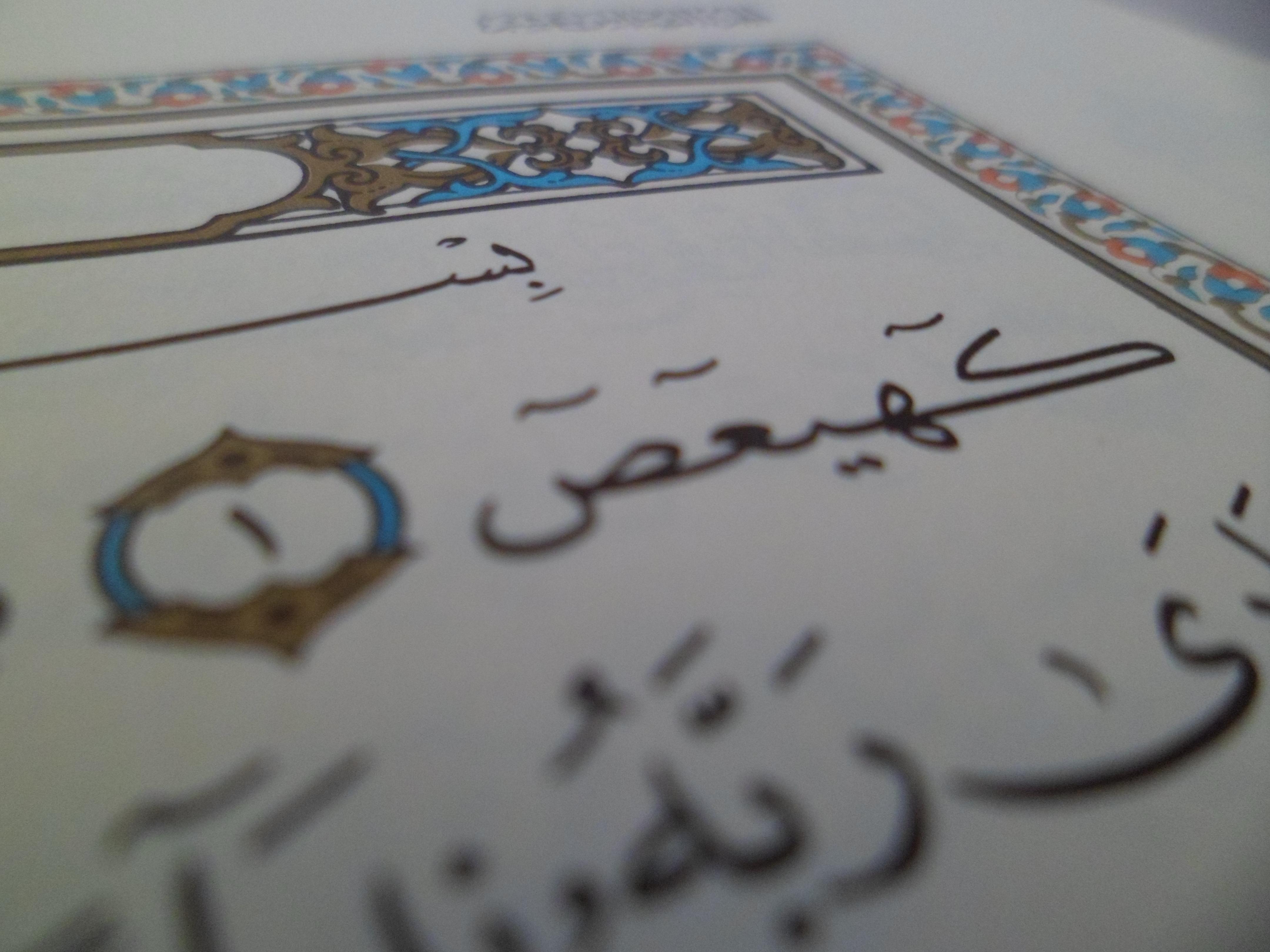 كهيعص، أول آيات سورة مريم